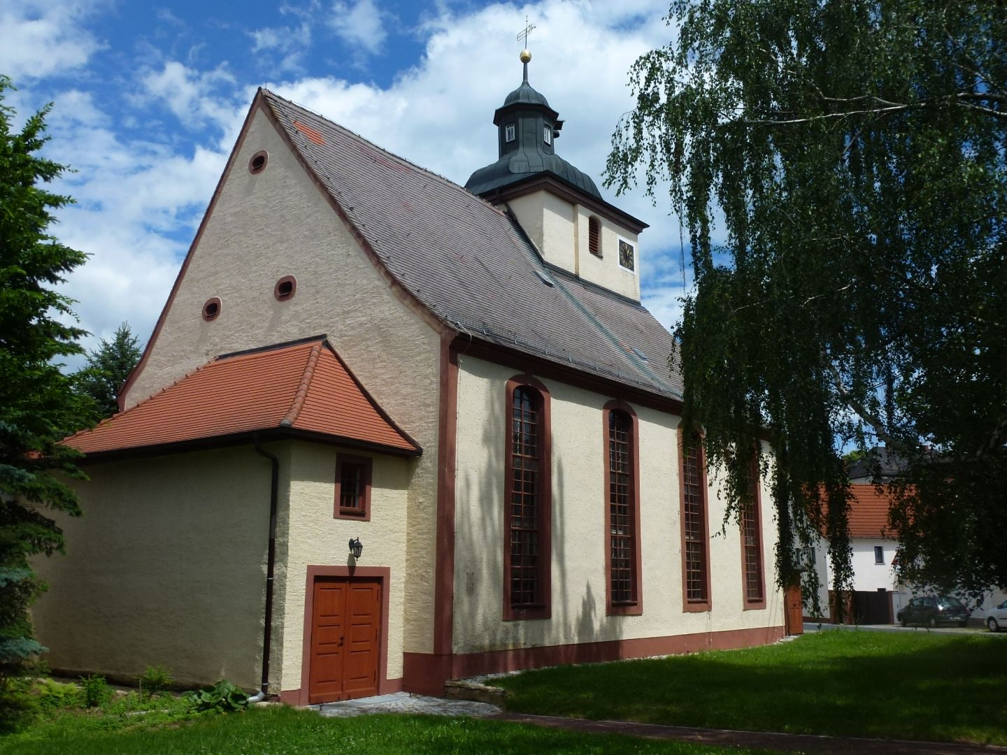 Kirche in Auligk